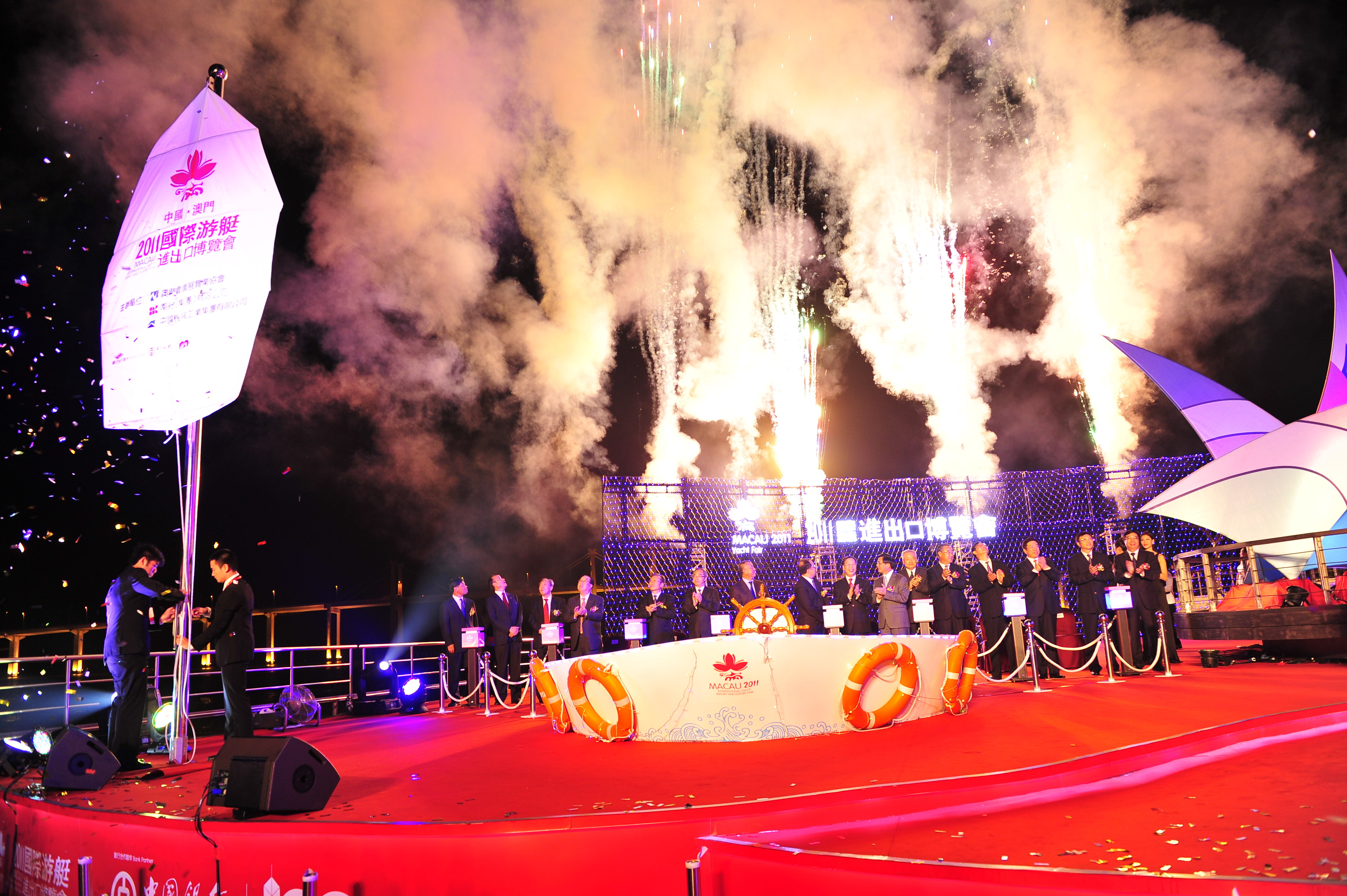 2011澳门游艇展闭幕式.JPG